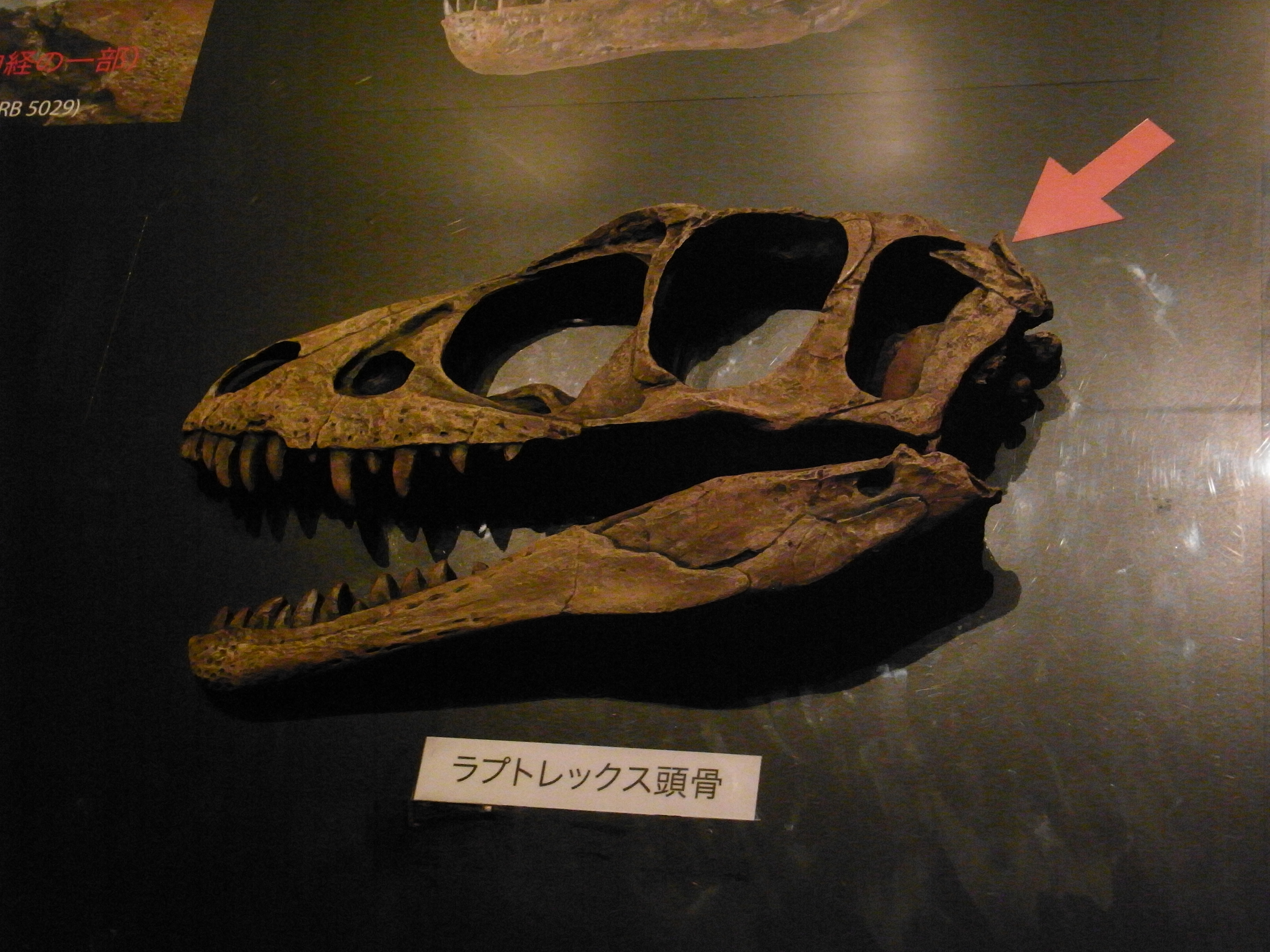 なんか凄い平べったい。